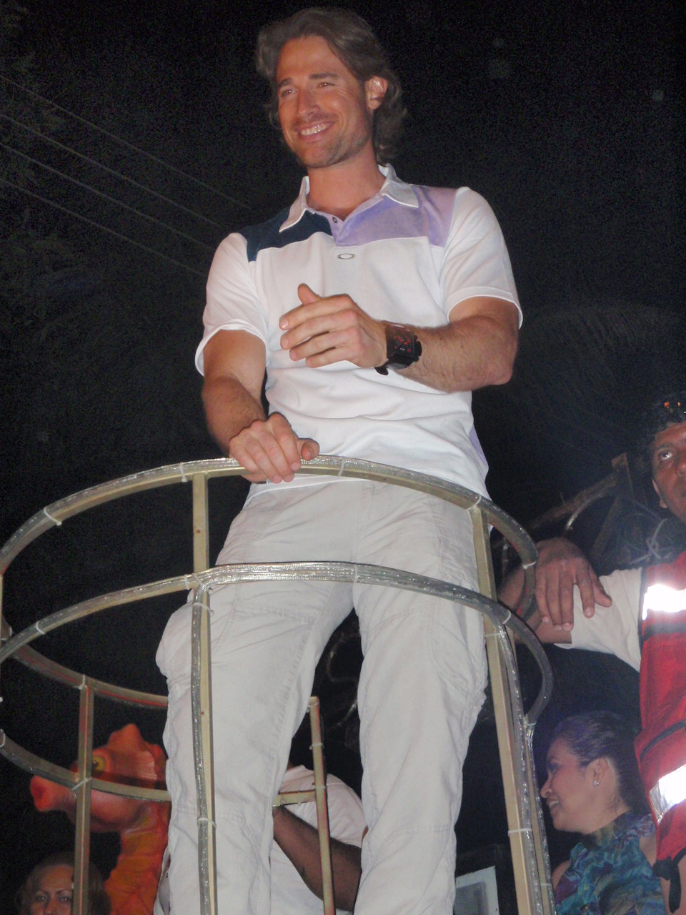 Sebastian Rulli en #carnavaldeTuxtepec